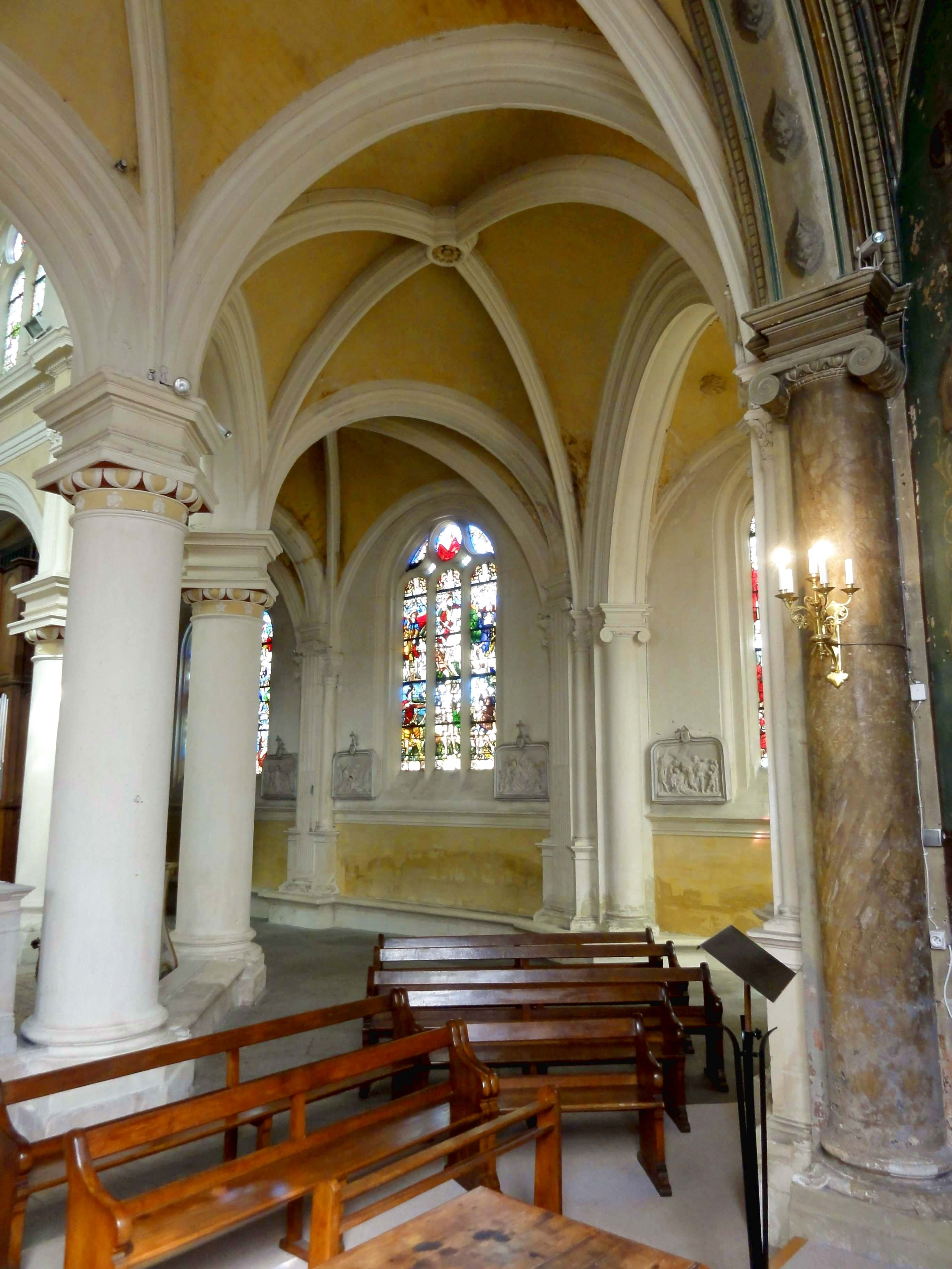 Intérieur de l'église - voir titre.